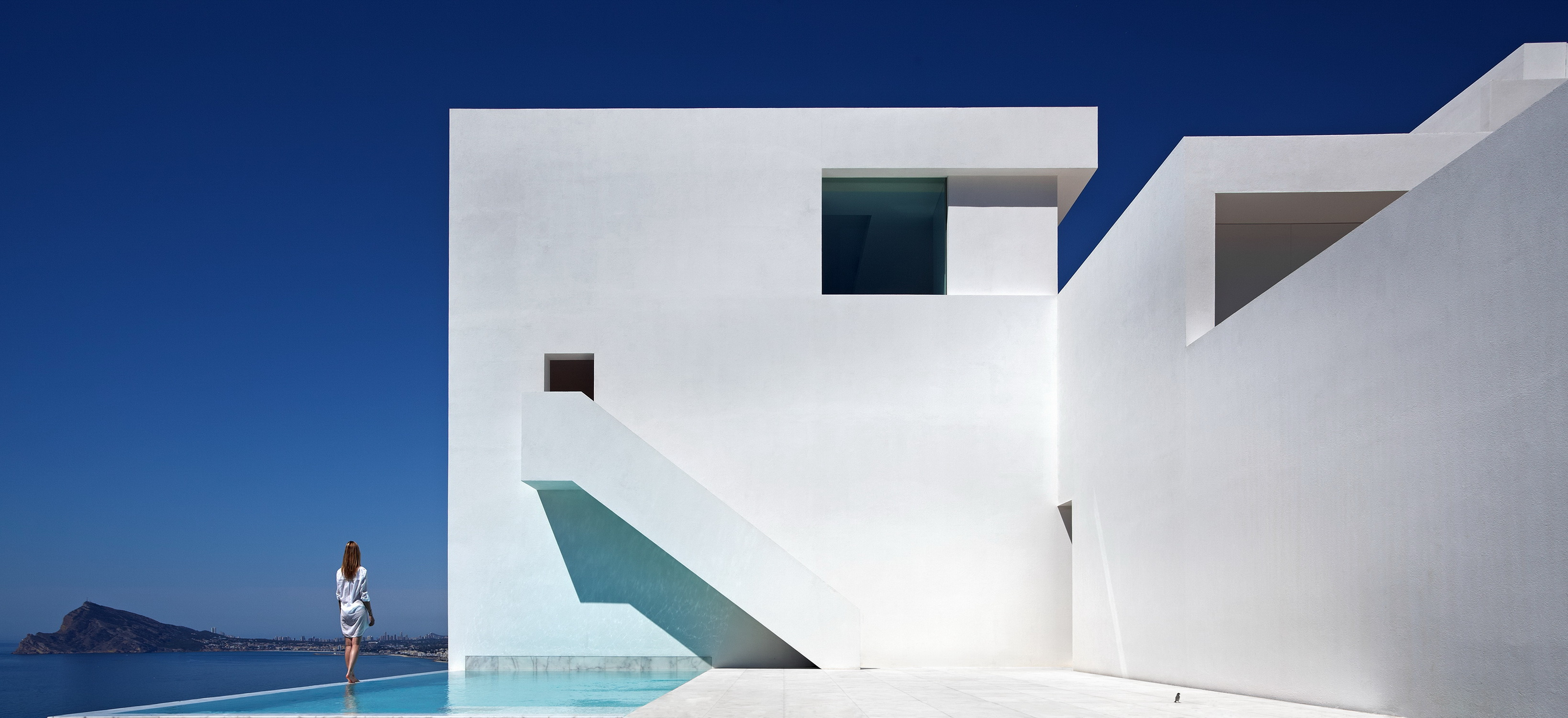 House on the cliff - Fran Silvestre Arquitectos